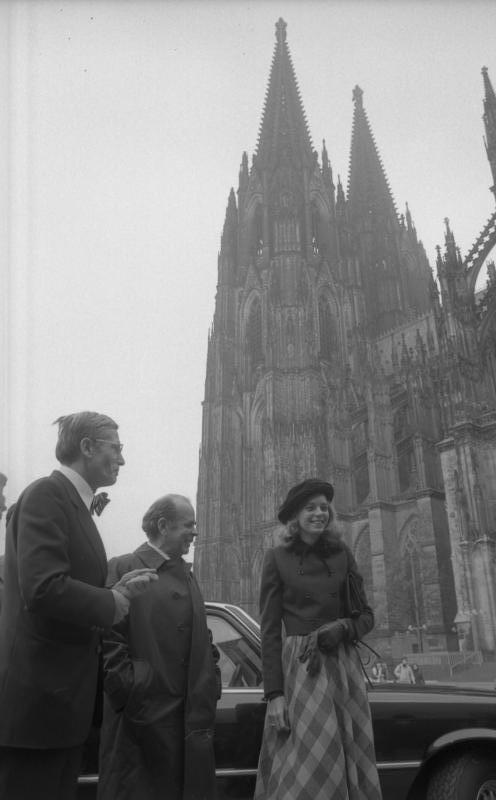 Staatsbesuch König Husskin II. und Königin Nur Al-Hussein in der Bundesrepublik Deutschland. (7.11.78) Köln: Königin Nur Al-Hussein besichtigt das Römisch-Germanische Museum. Information added by Wikimedia users.Zusatz: Die Person links ist Museumsdirektor Hugo Borger.